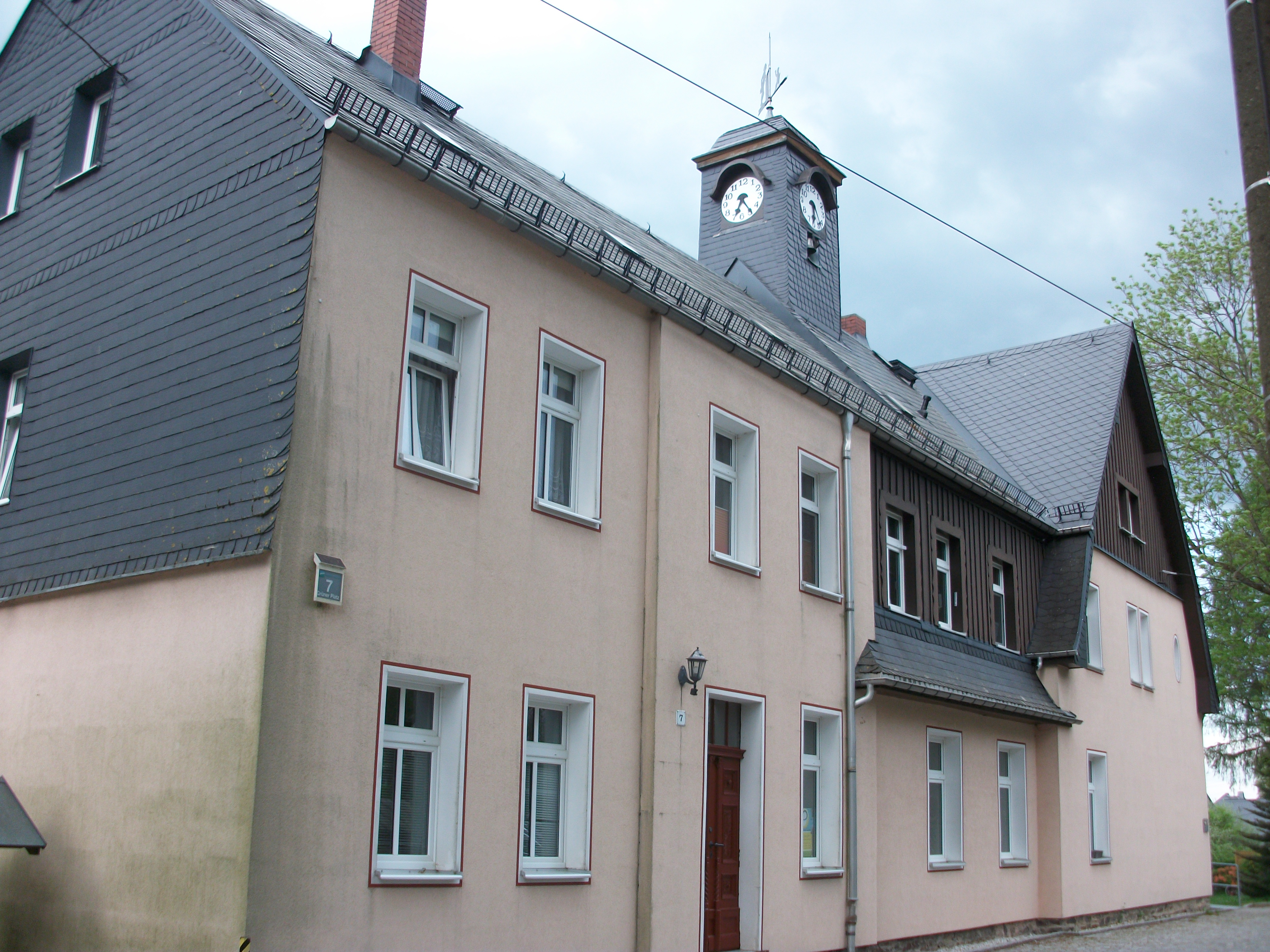 Griesbach, Grüner Platz 7 (Ehemalige Schule Griesbach)